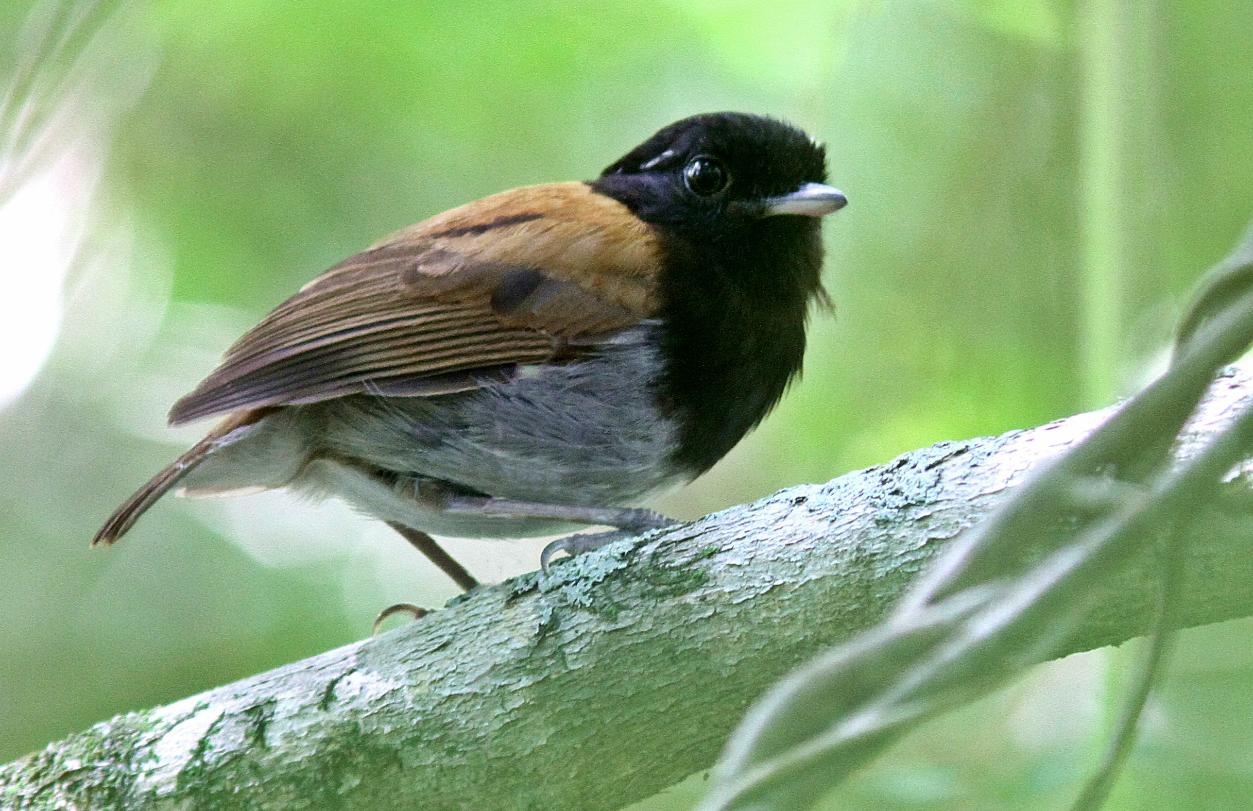 Chupa Dente de Capuz